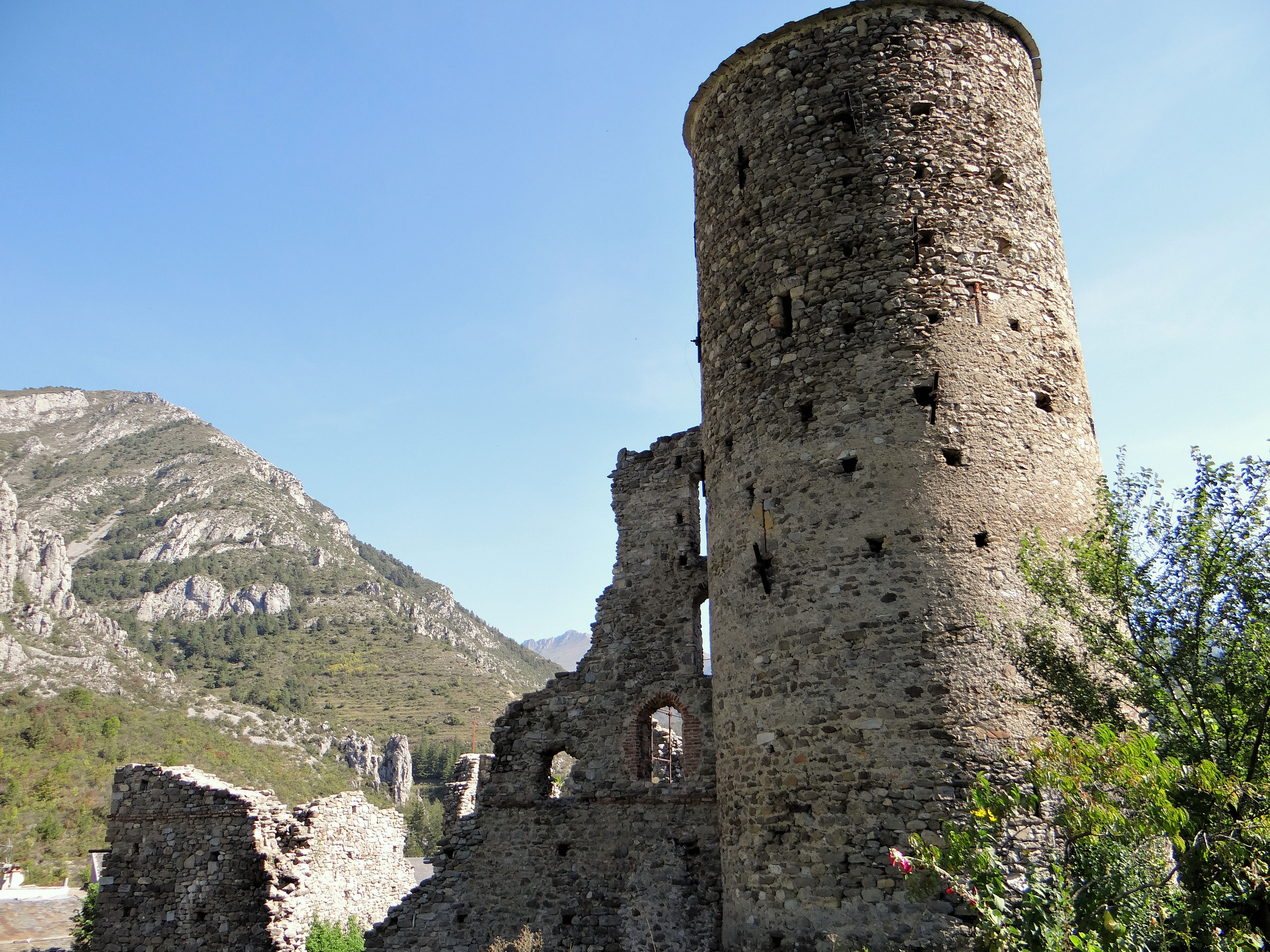 Château des Seigneurs de la Brigue - La tour et le côté ouest